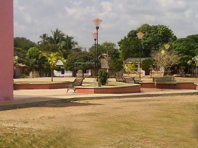 Esta fotografia fue tomada directamente por su autor en el corragimiento de Cayo de Palma, al lado de la iglesia principal.